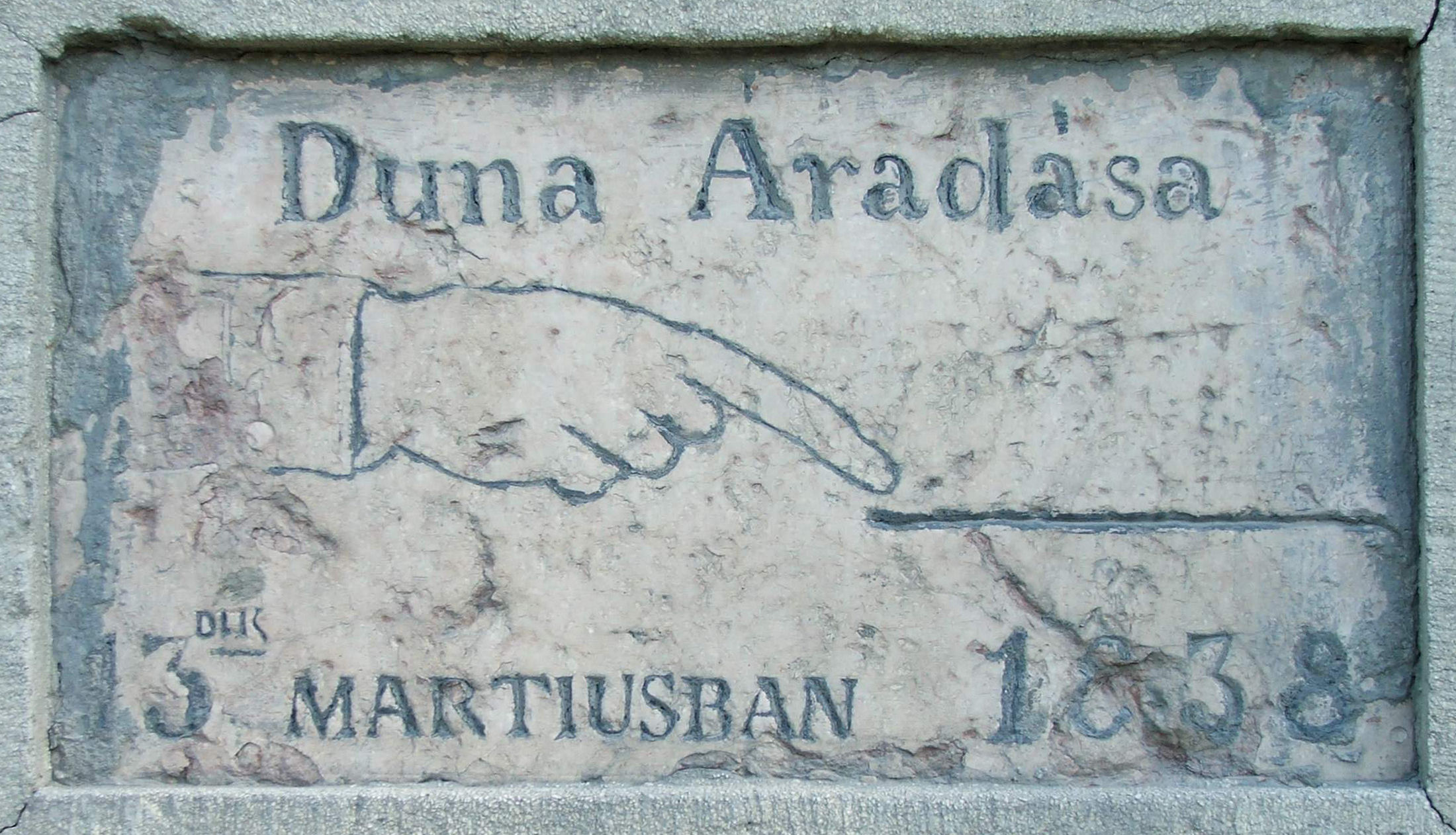 A Duna magassága 1838. Esztergomi Szegényház kápolnában a Terézia utcában